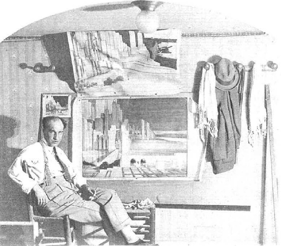 Fotografía del director de cine español Nemesio Manuel Sobrevila en su estudio de Madrid Film durante la época del rodaje de la película Al Hollywood madrileño.